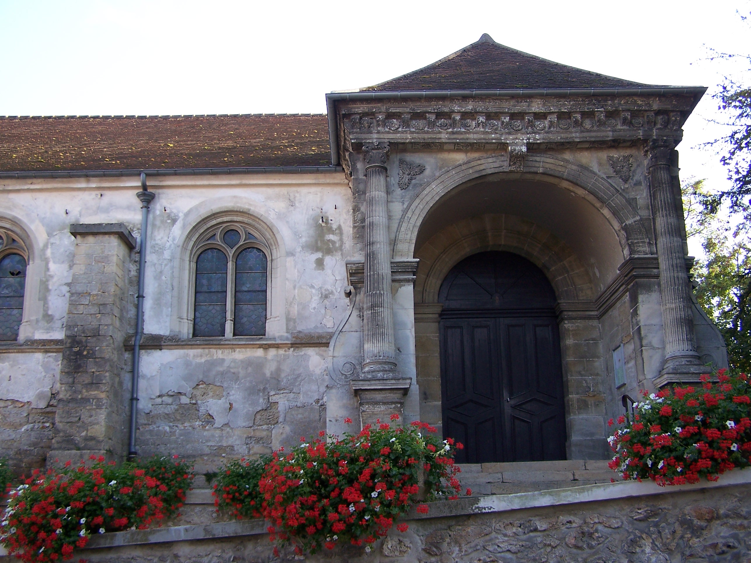 Le porche de l'église d'Évecquemont (Yvelines, France)